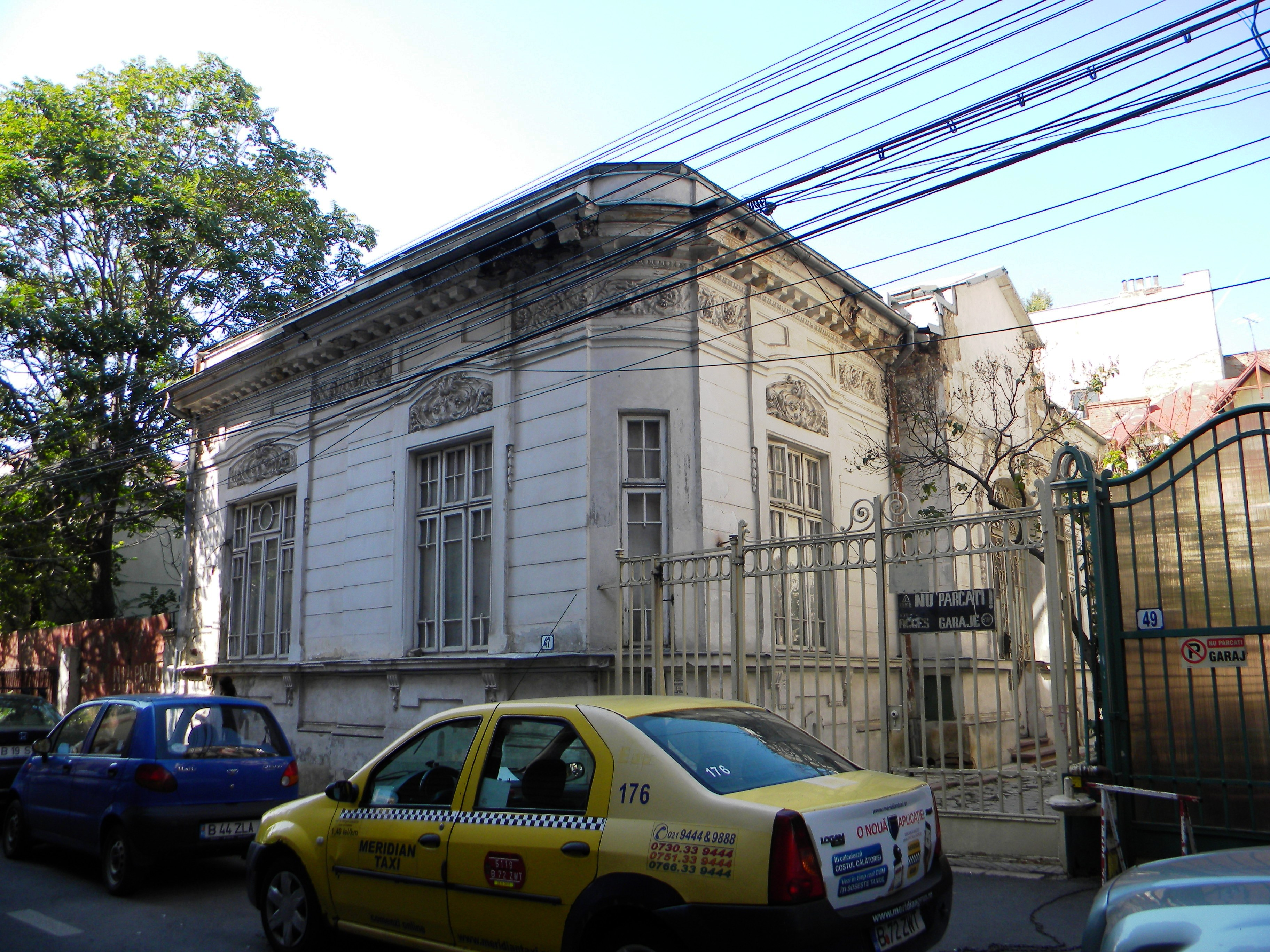 Bucuresti, Romania, Casa pe Str. Frumoasa nr. 47, sect. 1, (1)